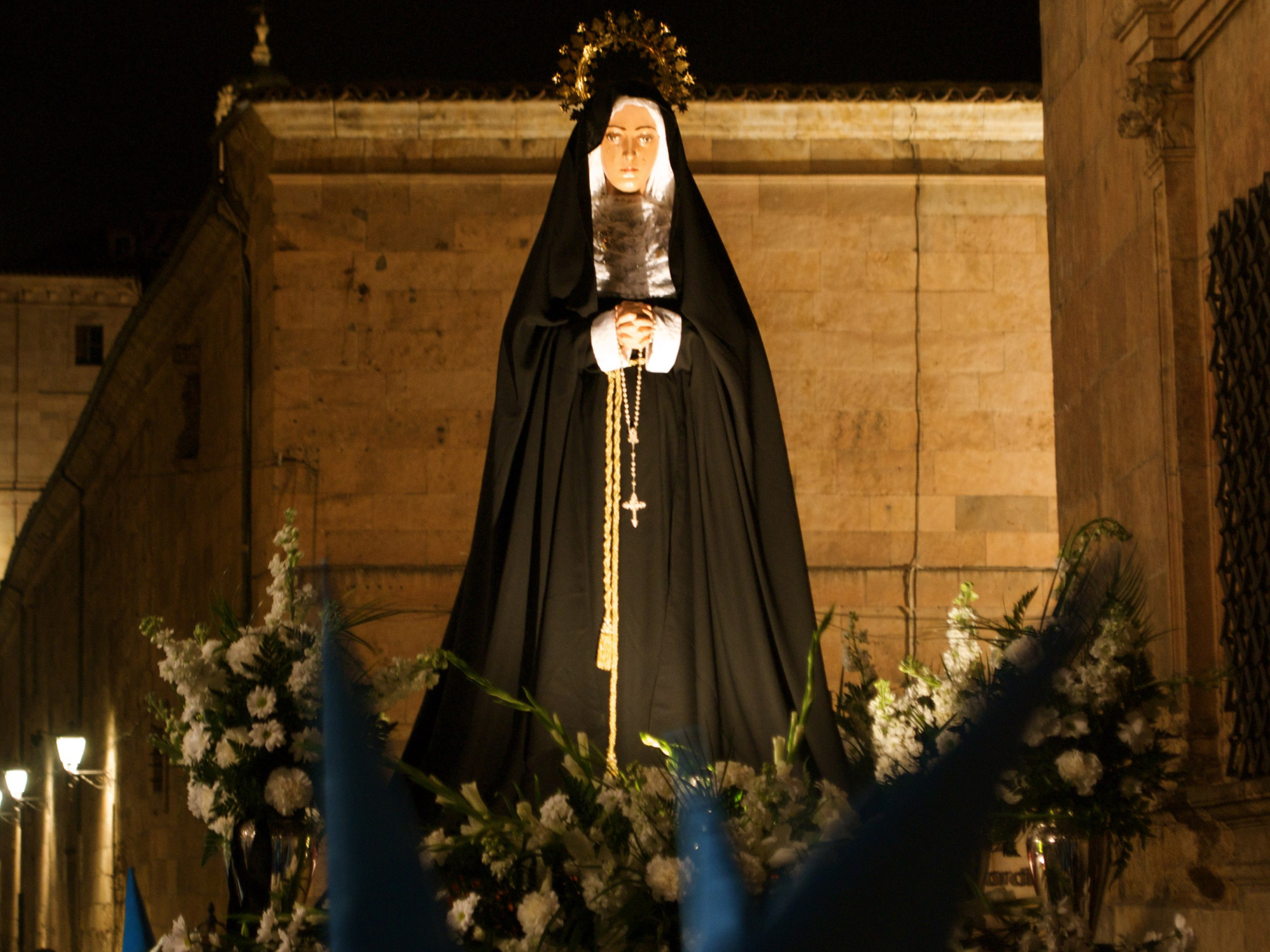 Salamanca 6. - 8. March 2009